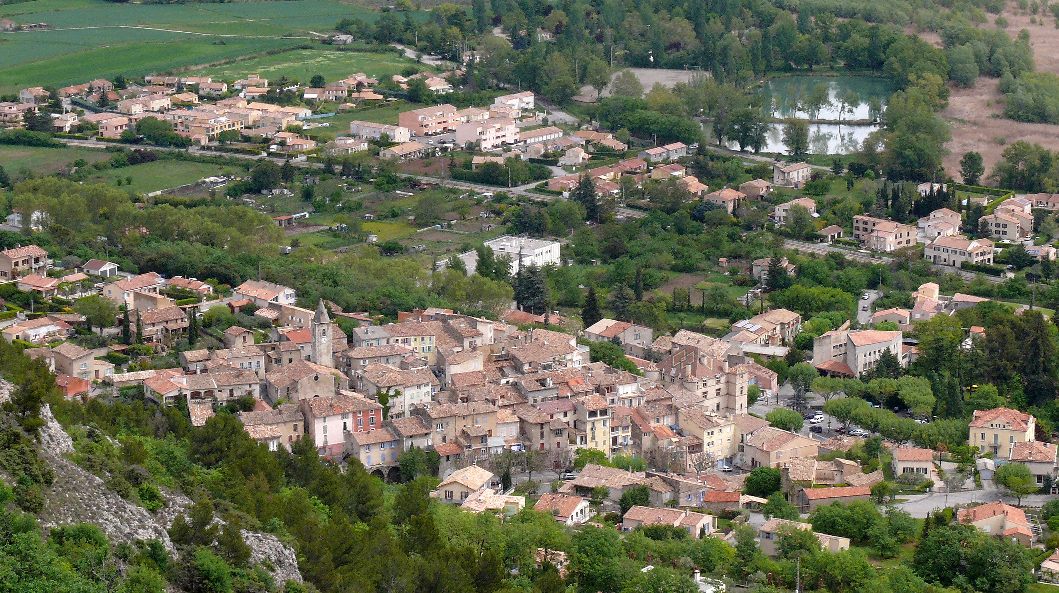 Chateau Arnoux